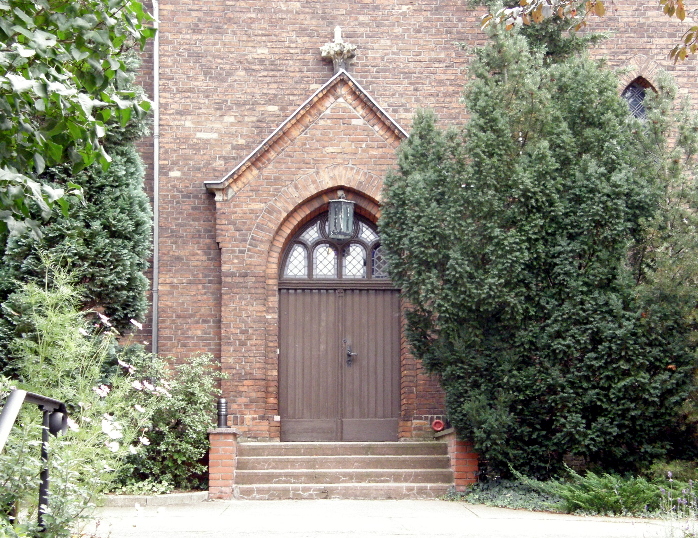 Berlin-Kaulsdorf, Dorfkirche in der Dorfstraße: Westportal